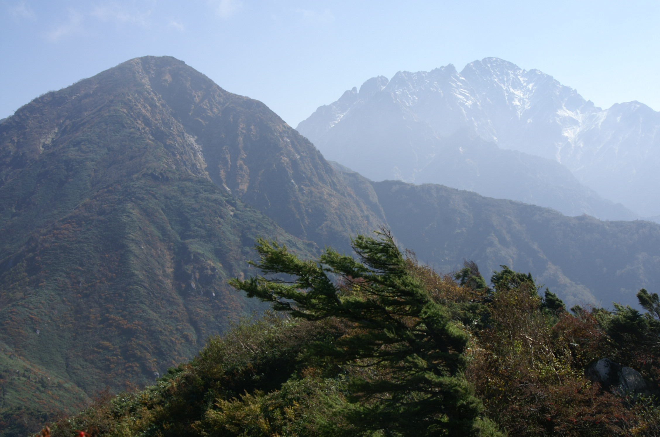 猫又山から赤谷山(左)を望む。奥は剱岳